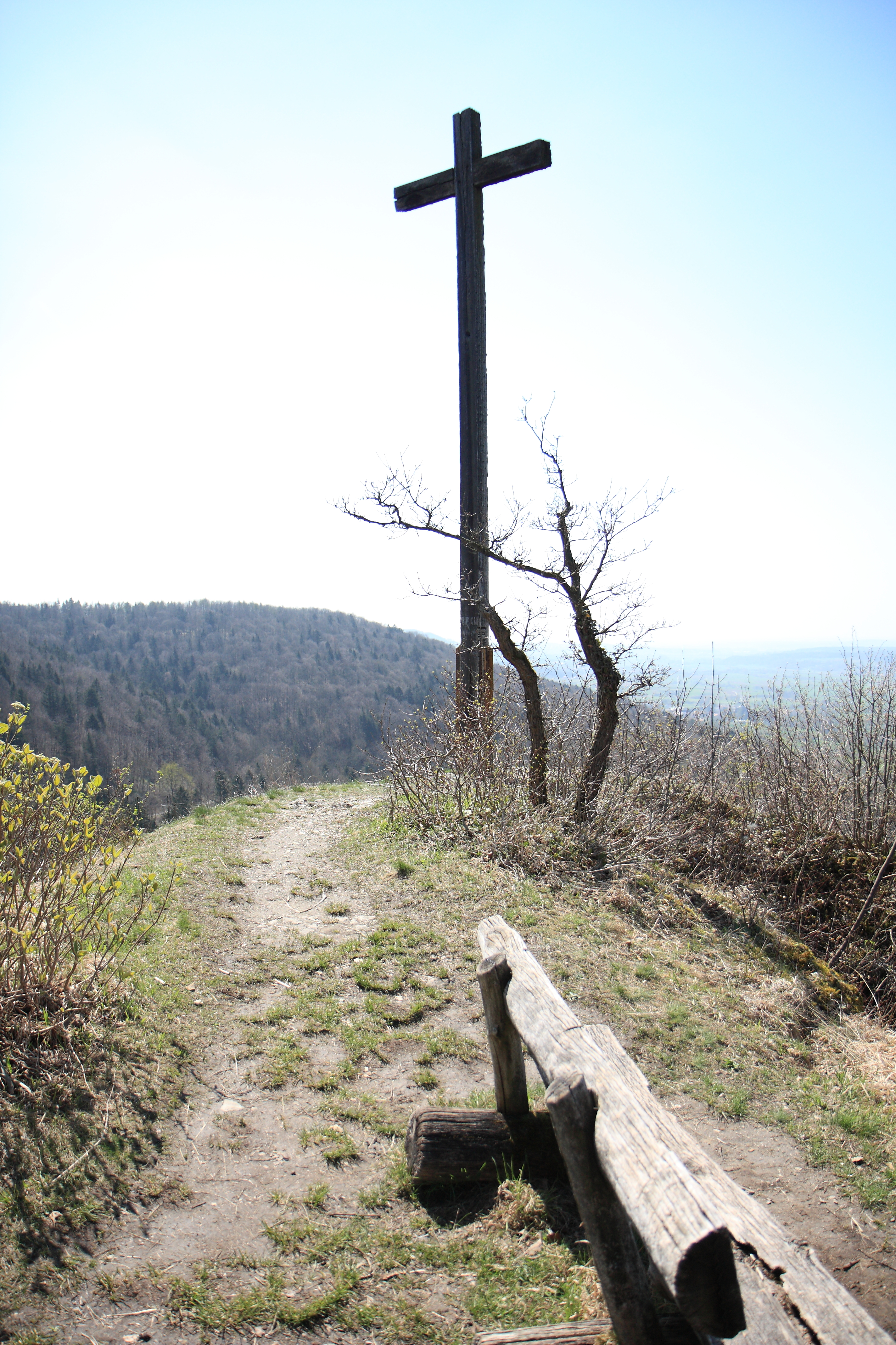 Stelle der Hauptburg der ehemaligen Burg Schlüsselstein über Ebermannstadt